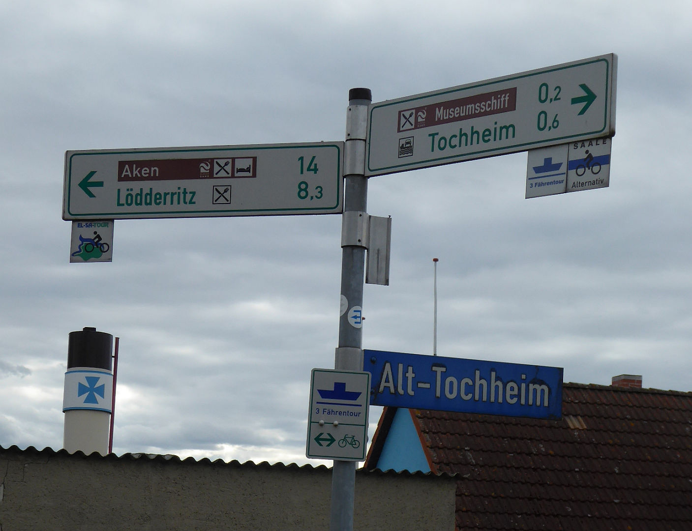 Wegweiser der 3 Fähren-Tour in Breitenhagen